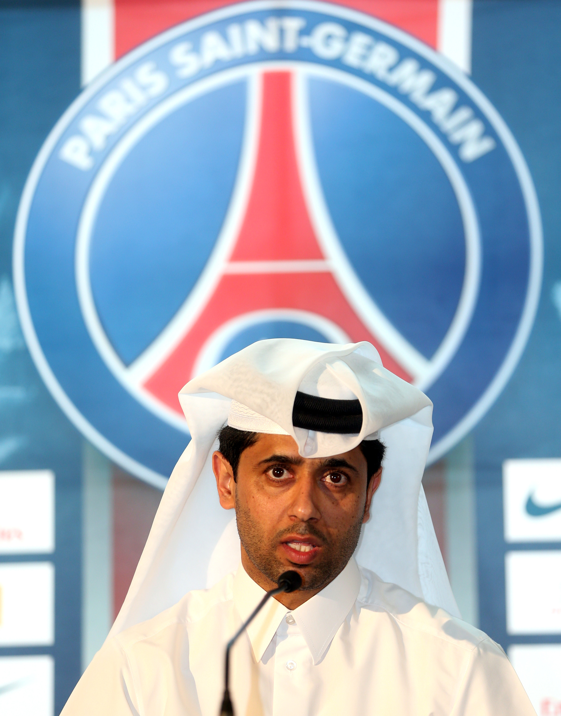 Nasser Al-Khelaïfi à Doha